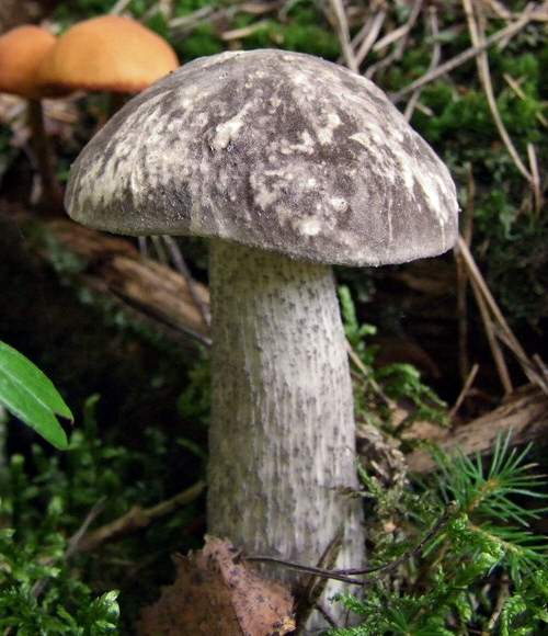 Leccinum variicolor. Karmėlava forest, Lithuania.